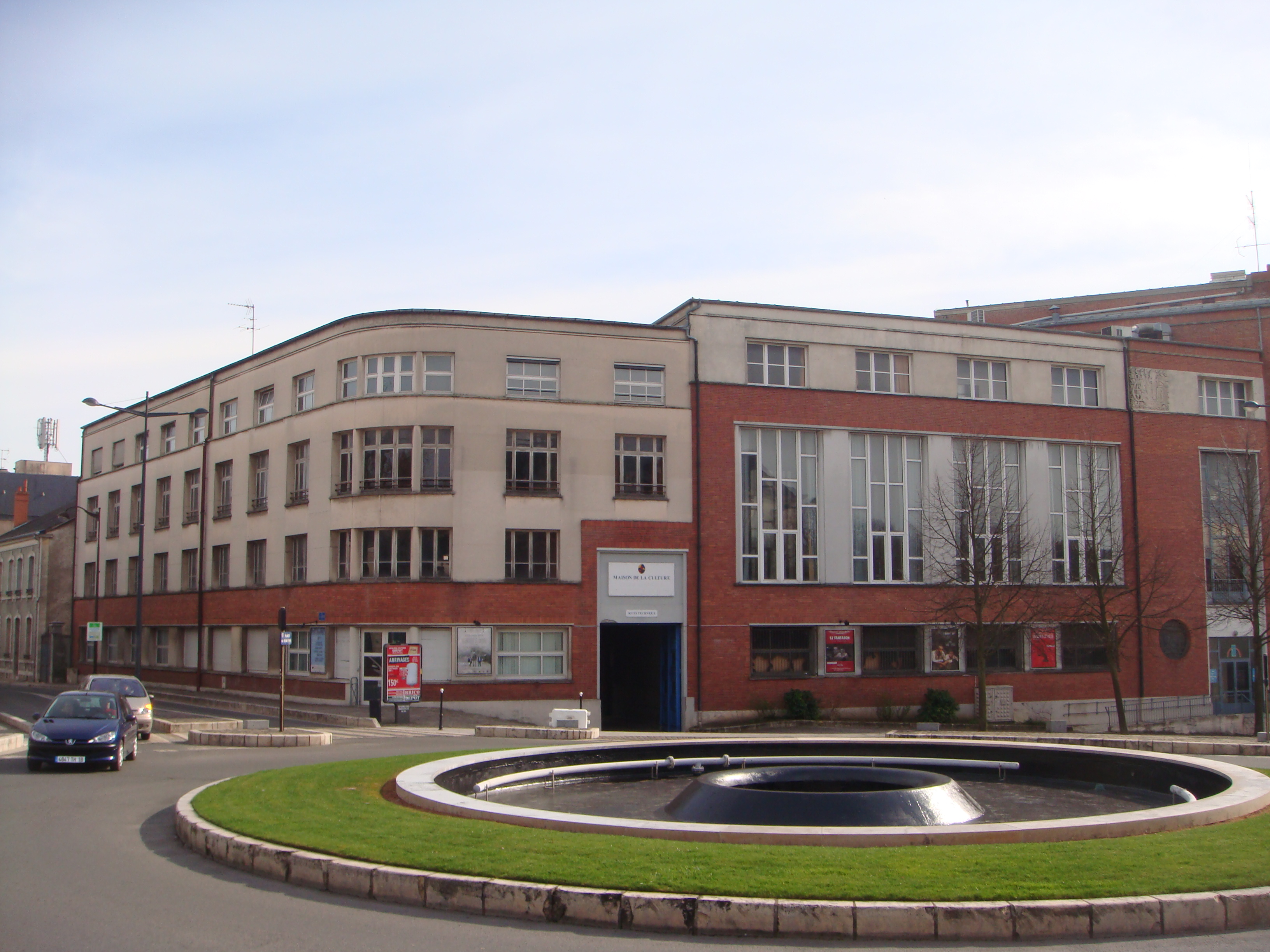 La Maison de la Culture de Bourges, à gauche, les locaux de l'ancienne école de la Musique. Photo prise le 20 mars 2011.